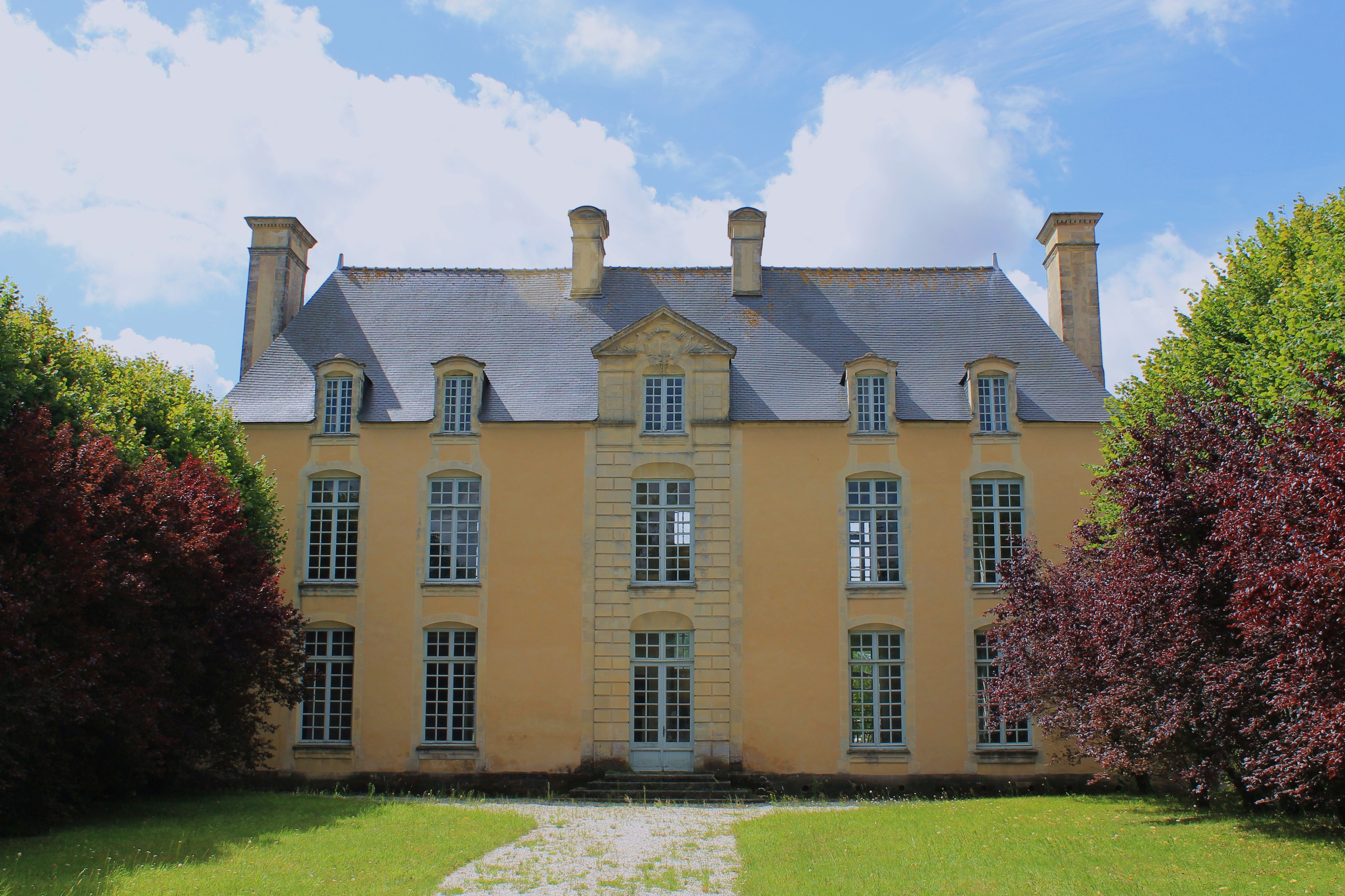 Château de la Motte à Bretteville-l'Orgueilleuse (Calvados)